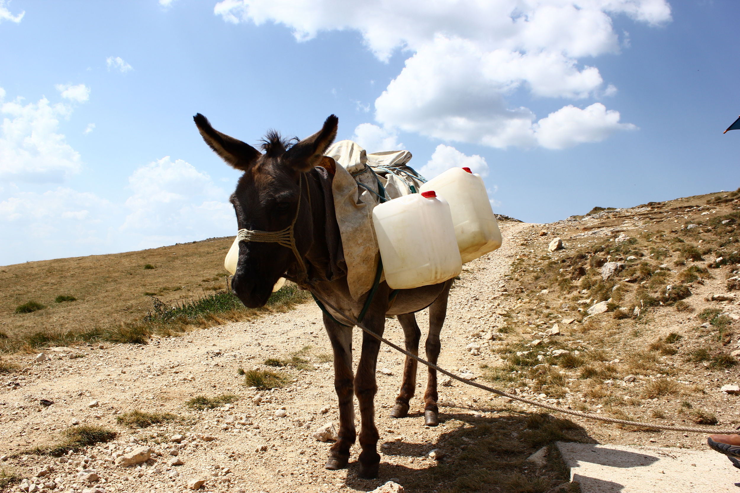 Esel mit Wasserkanistern auf dem Vlašić.